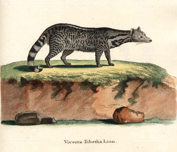 Viverra zibetha, plate from Schreber, Johann Christian Daniel von, Histoire naturelle des quadrupèdes représentés d´après nature. Tome III. Le phoque, le chien, le chat, le putois, la loutre, la marte, l'ours, le didelphe, la taupe, la souris, le hérisson A Erlang, chez Wolfgang Walther, 1780